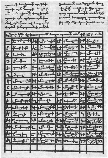 Классификация лекарственных свойств согласно книге «Ненужное для неучей» Амирдовлата Амасиаци Классификация лекарственных свойств согласно книге «Ненужное для неучей» Амирдовлата Амасиаци